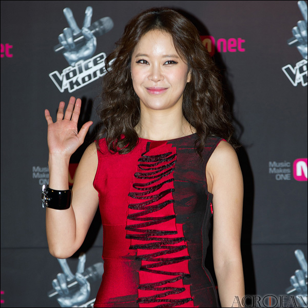 백지영. '보이스코리아' 제작발표 및 하이라이트 시사회에서